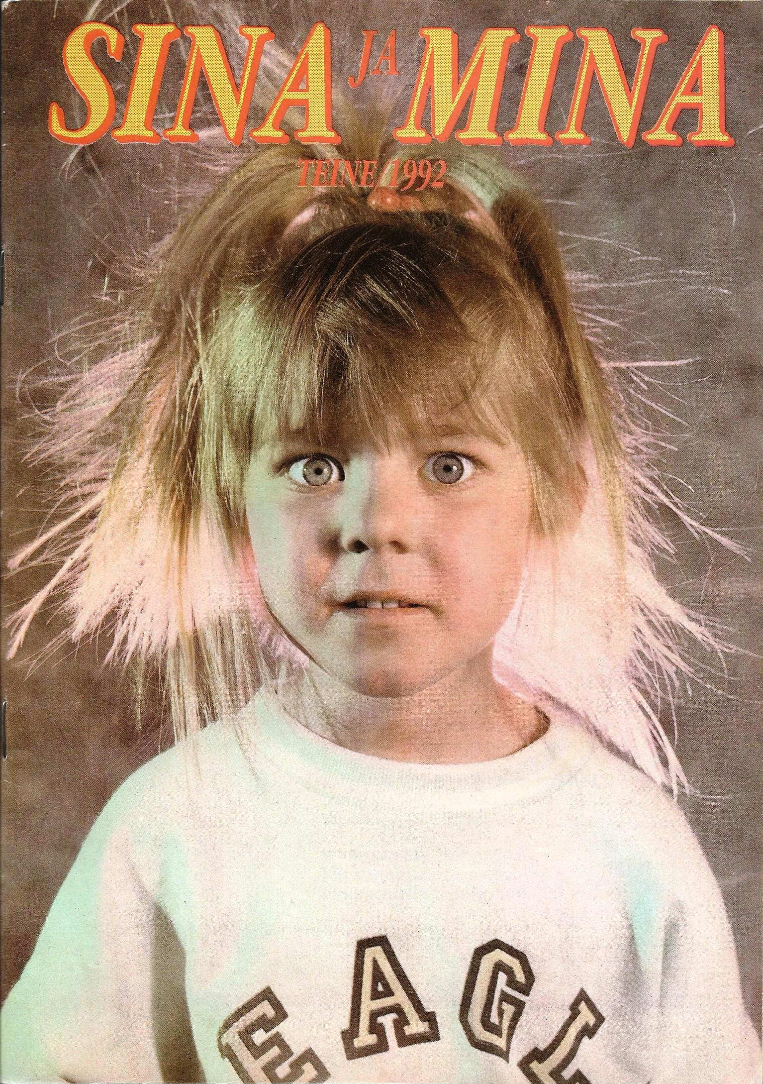 Ajakirja Sina ja Mina 1992, nr. 2 esikaas